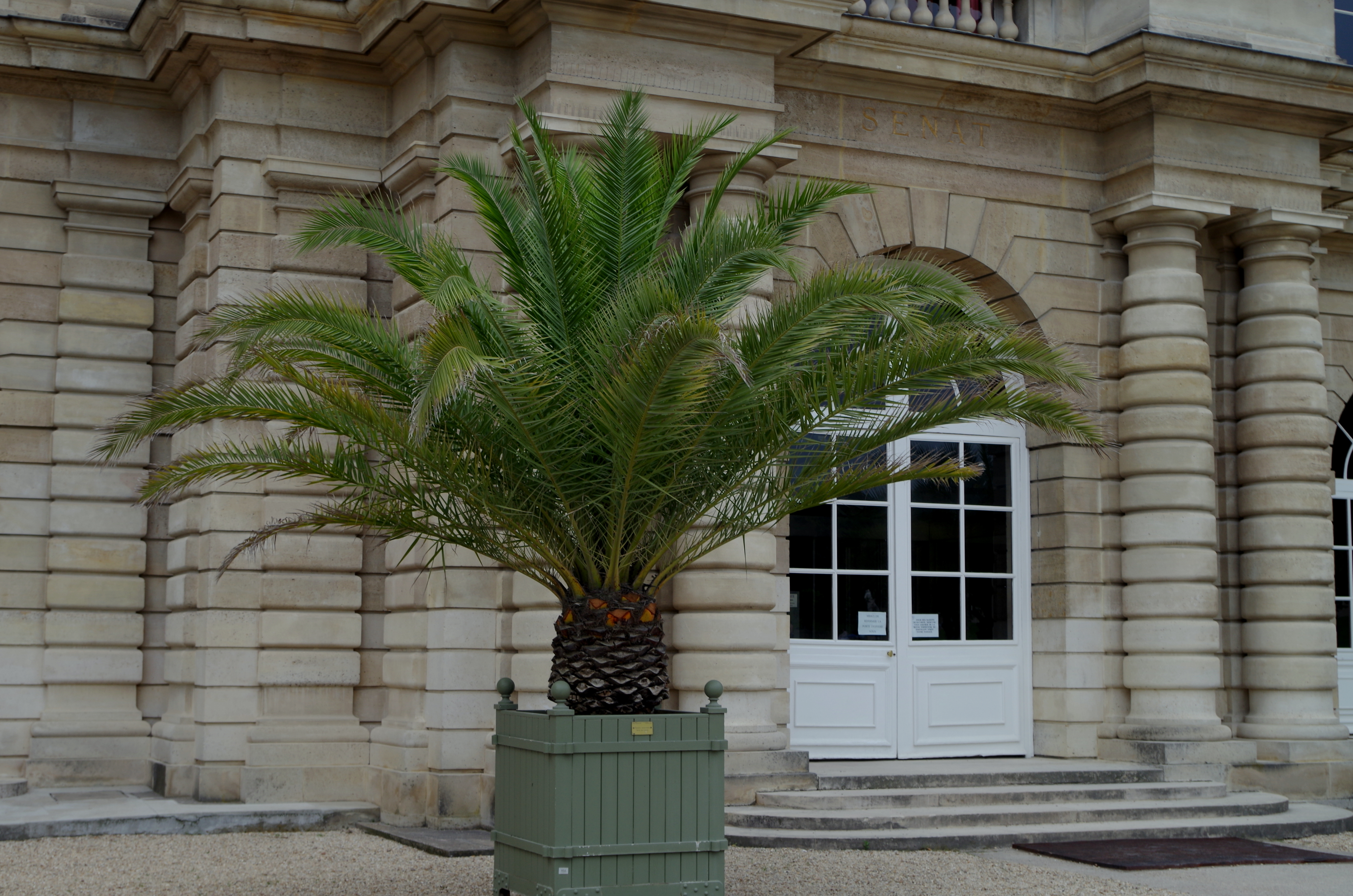 Palmier devant l'entrée du Sénat